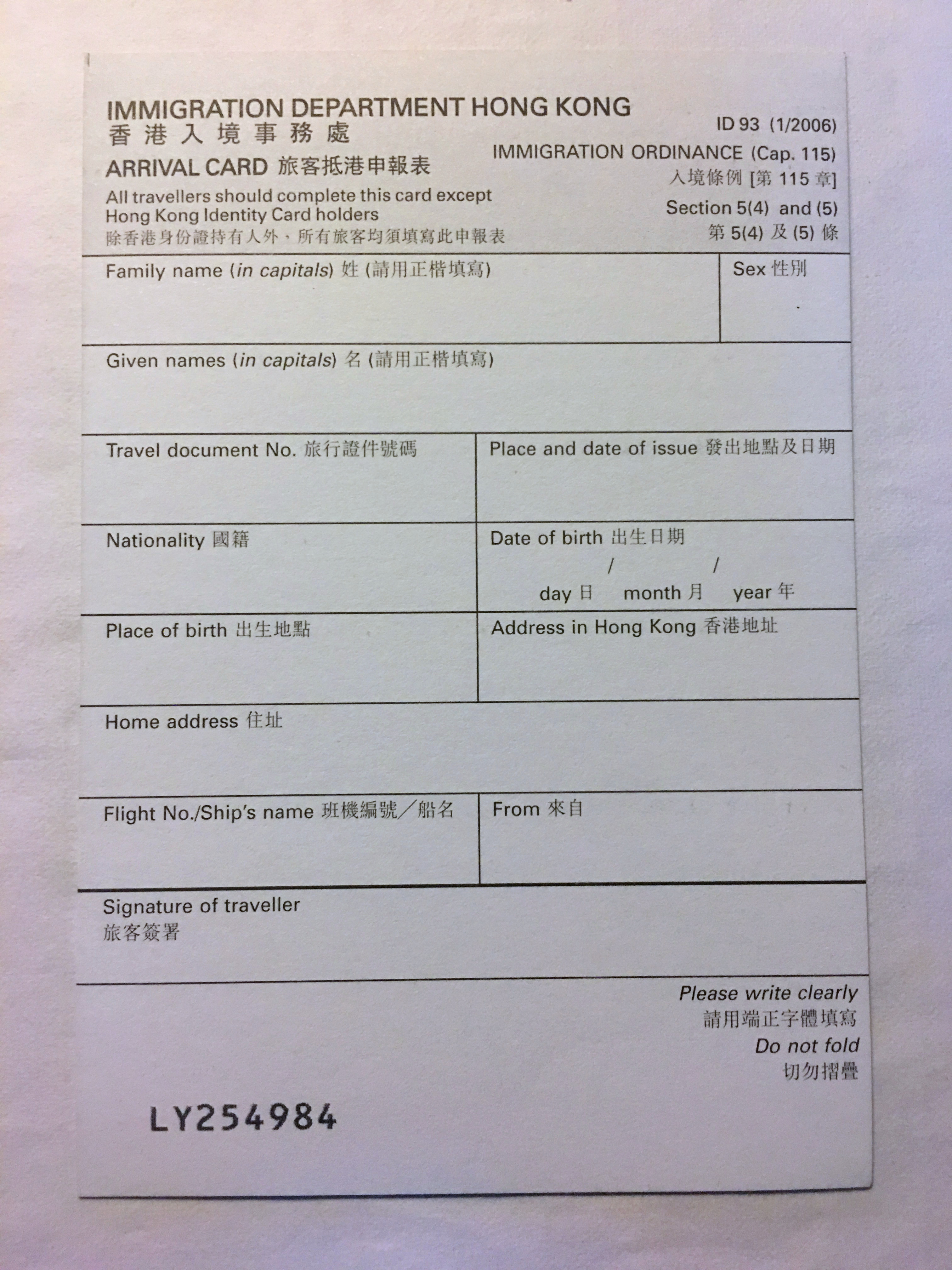 中文（中国大陆）: 香港入境卡